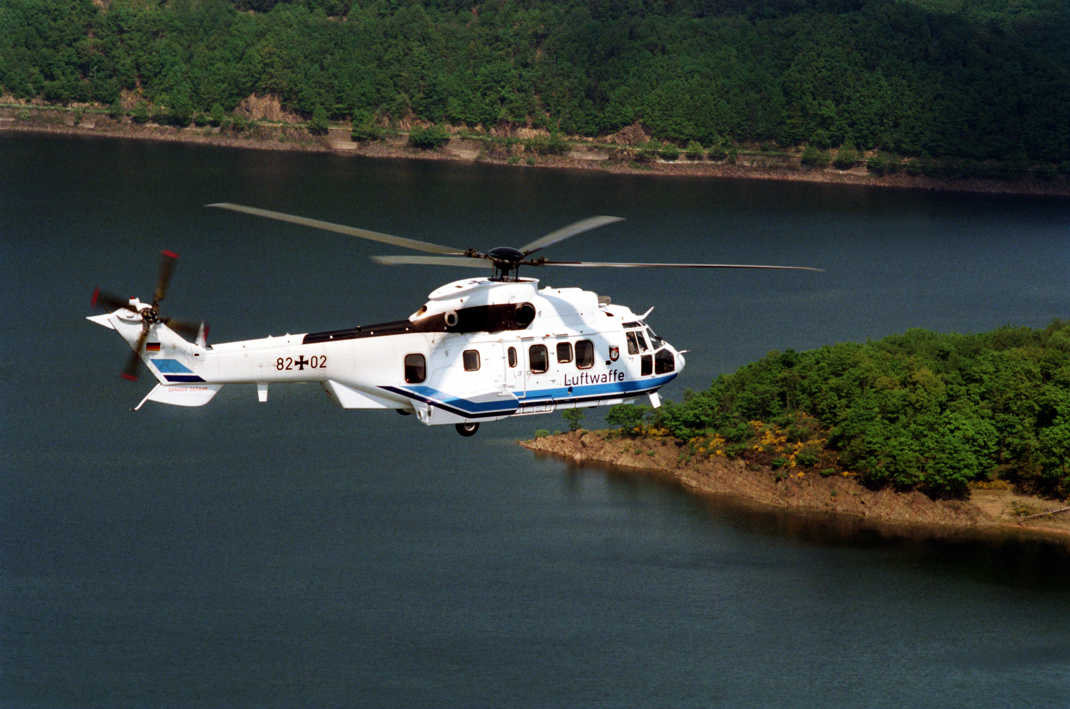 Cougar AS 532 MK 2, VIP-Hubschrauber. der Flugbereitschaft fliegt über dem Rhein. ©Bundeswehr/Mandt